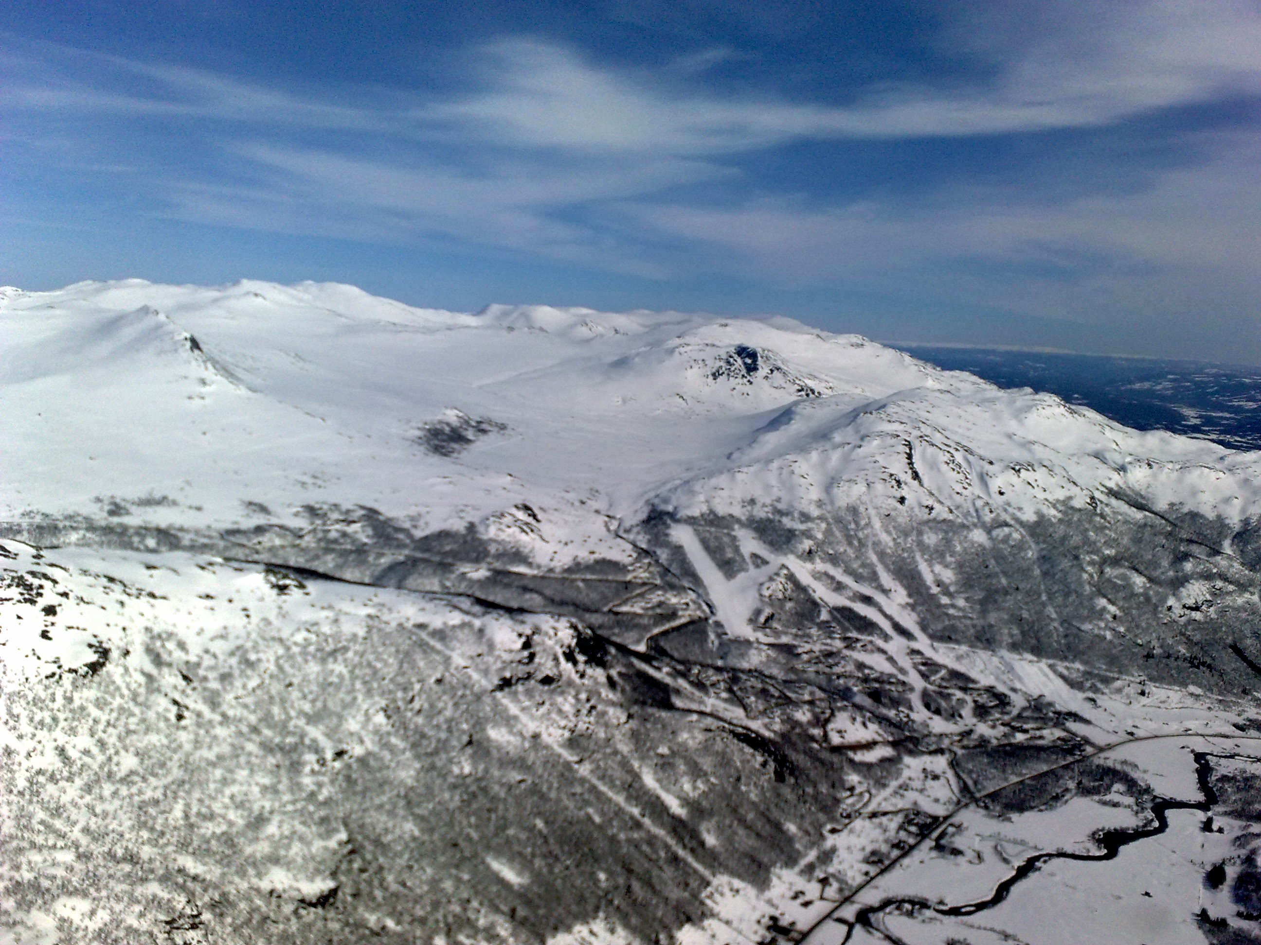 Hemsedal sett frå fly